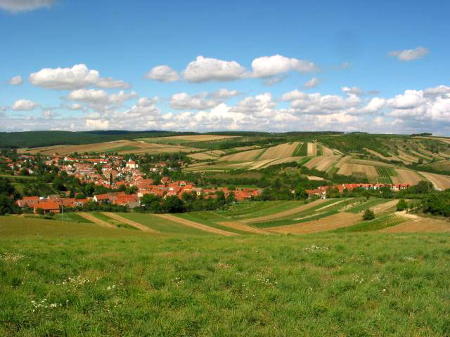 celkový pohled na Dambořice z větší dálky za jasné oblohy